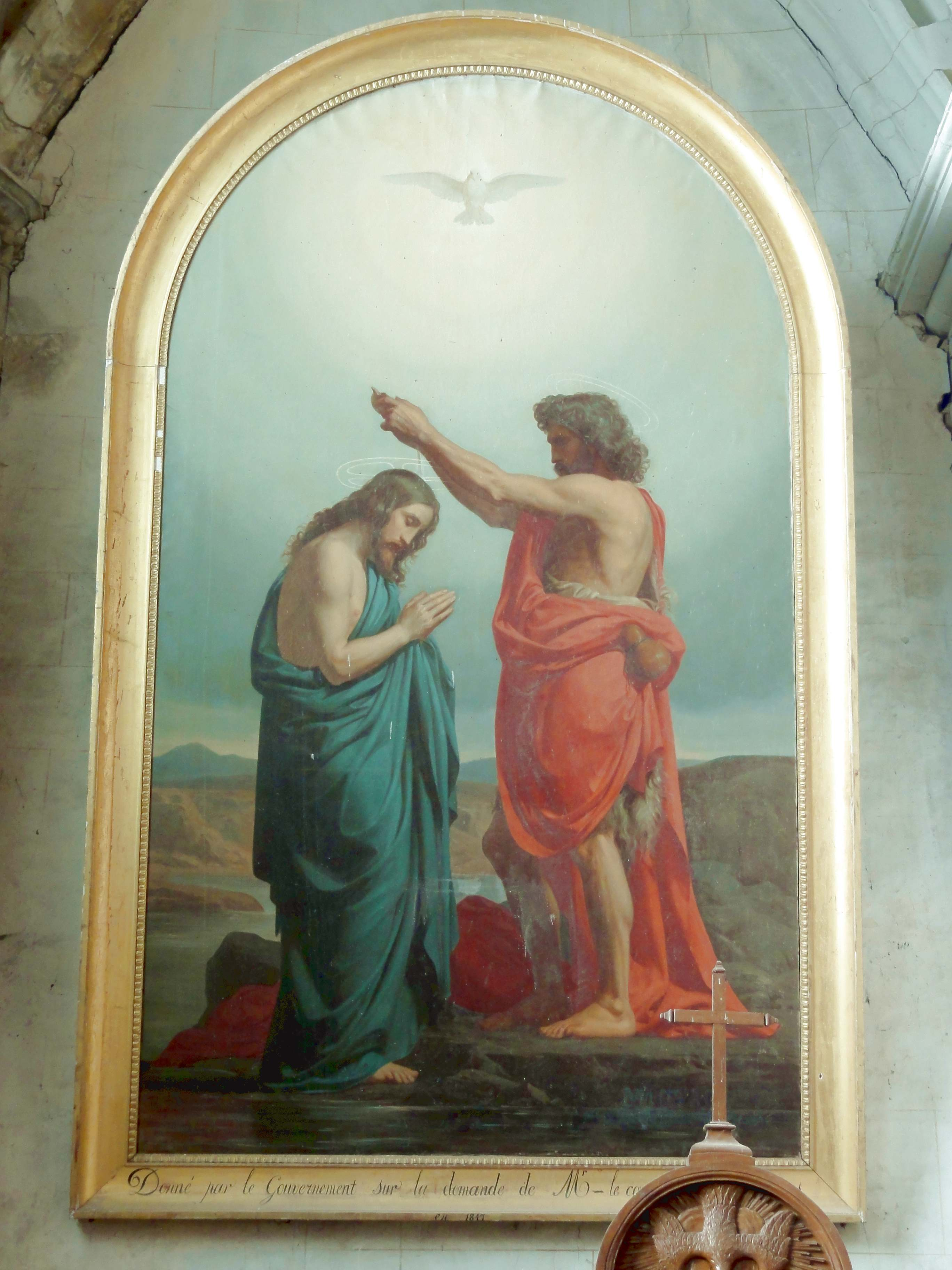 Tableau - baptême du Christ, donné par le gouvernement en 1847 à la demande du comte de Ferronet.